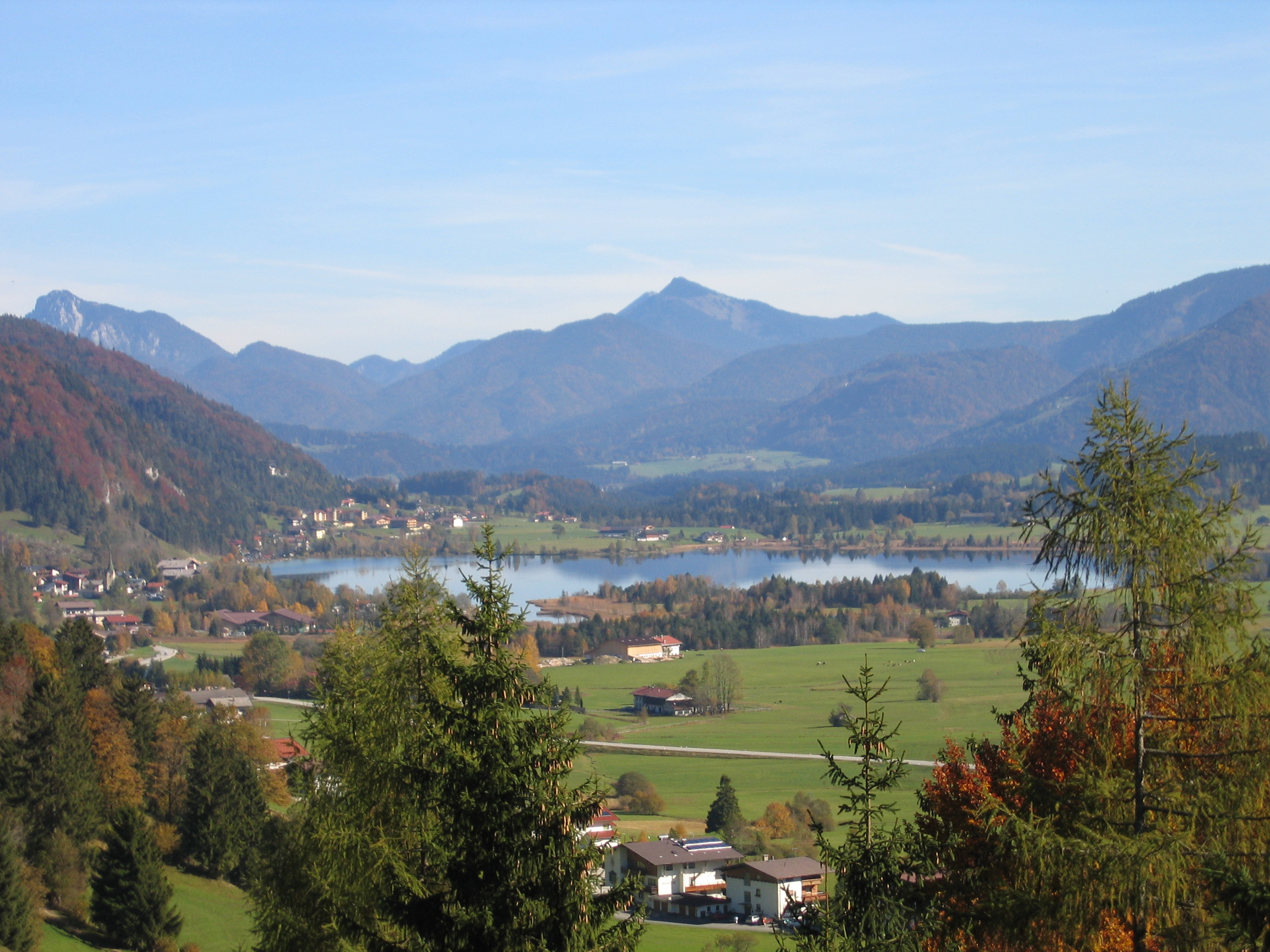 Walchsee